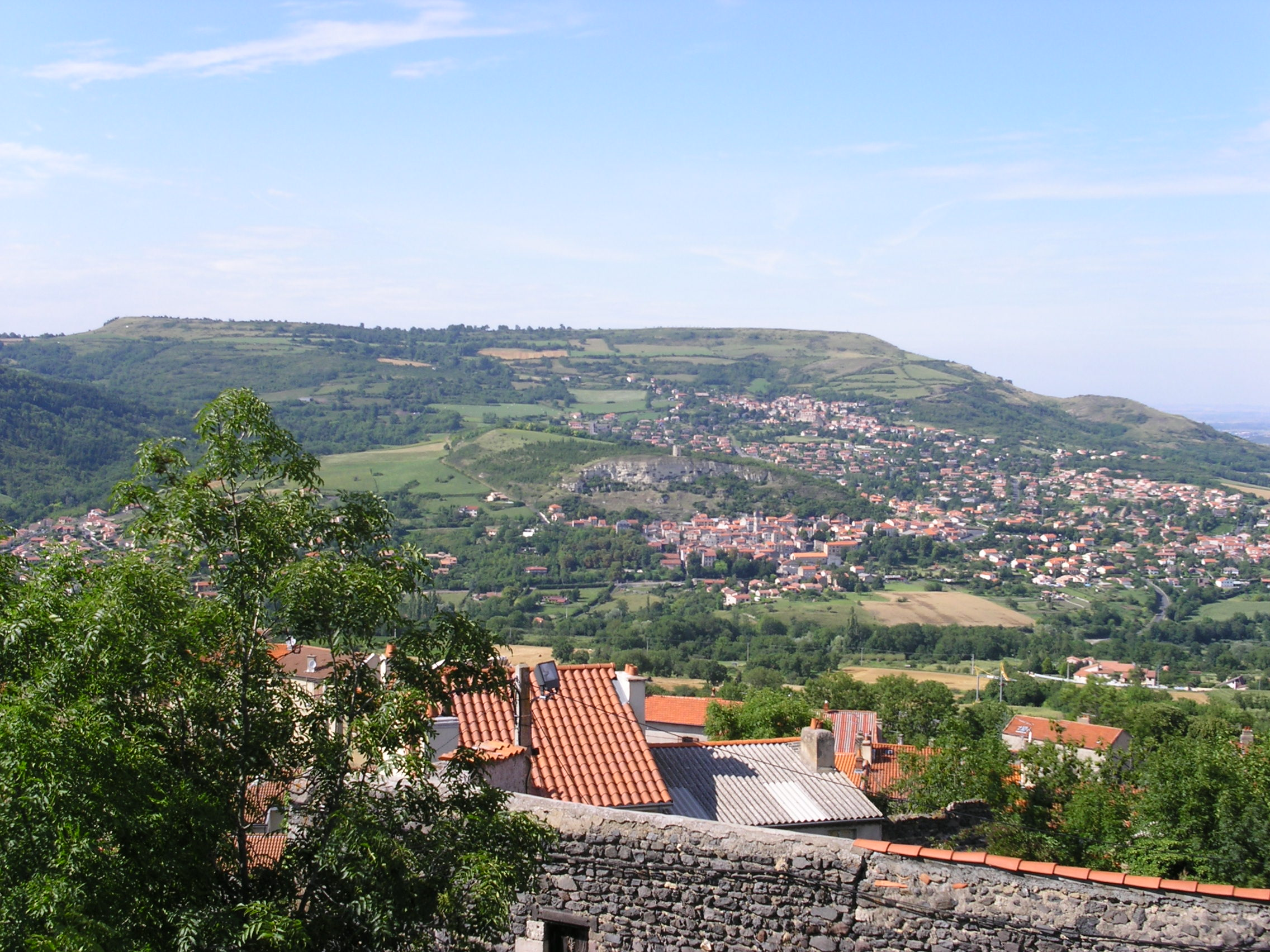 Dorfansicht La Roche Blanche, Puy de Dôme